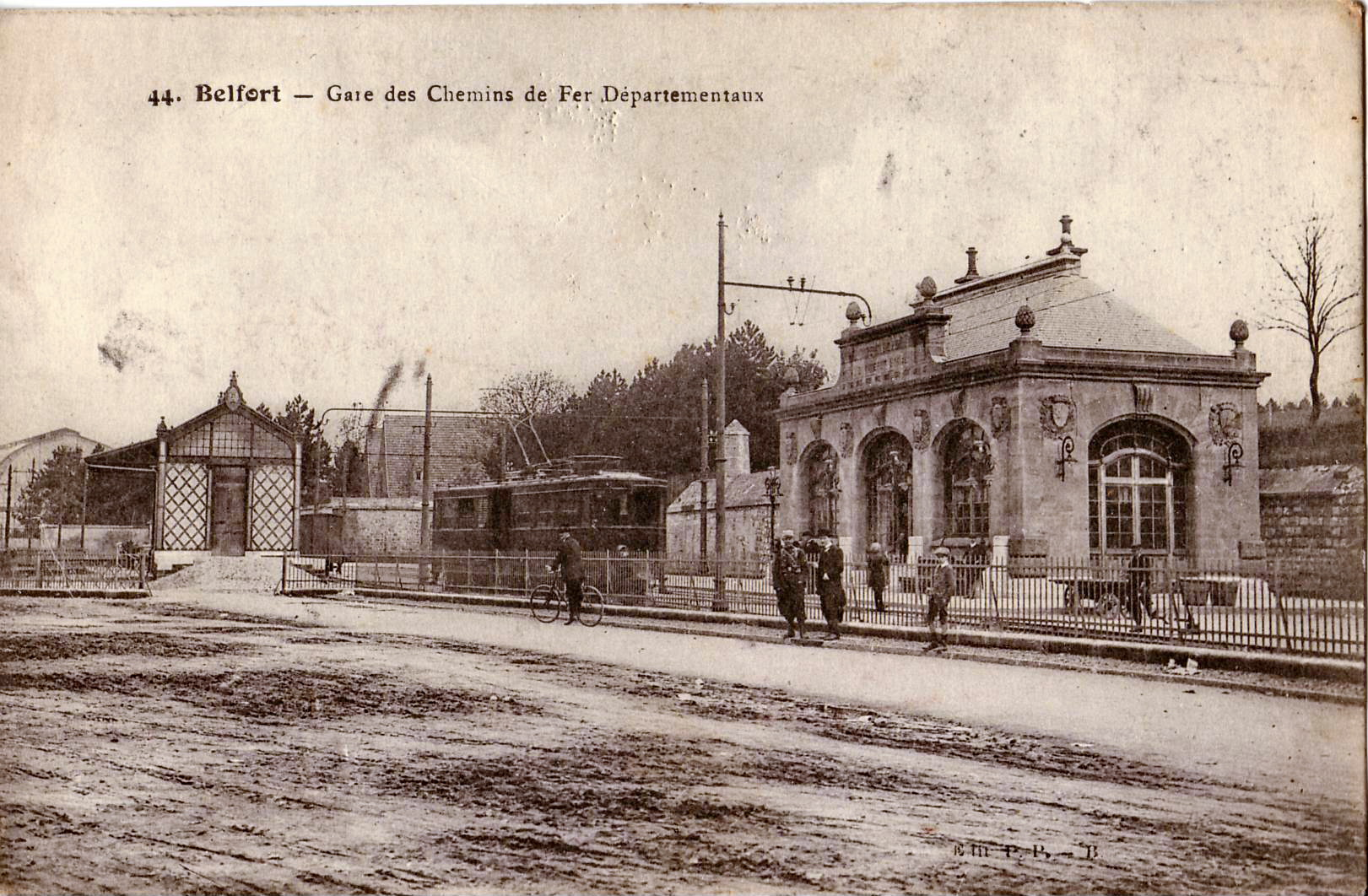 Carte postale ancienne éditée par P. P. - B., n°44 : Belfort - Gare des Chemins de fer départementaux (Chemins de Fer d'Intérêt Local du Territoire de Belfort